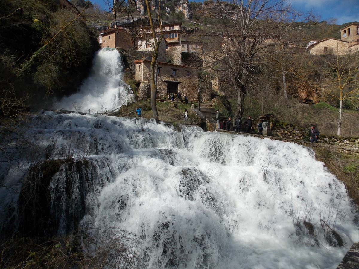 Curso de agua a través del pueblo de Orbaneja del Castillo en crecida.